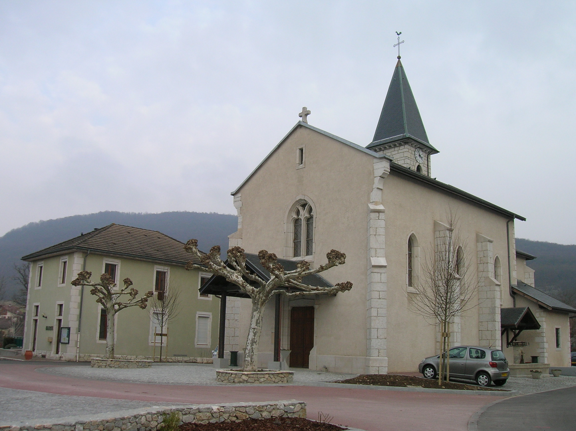 Eglise Saint-Hilaire, Musièges, Haute-Savoie. Première moitié du XIXème siècle.